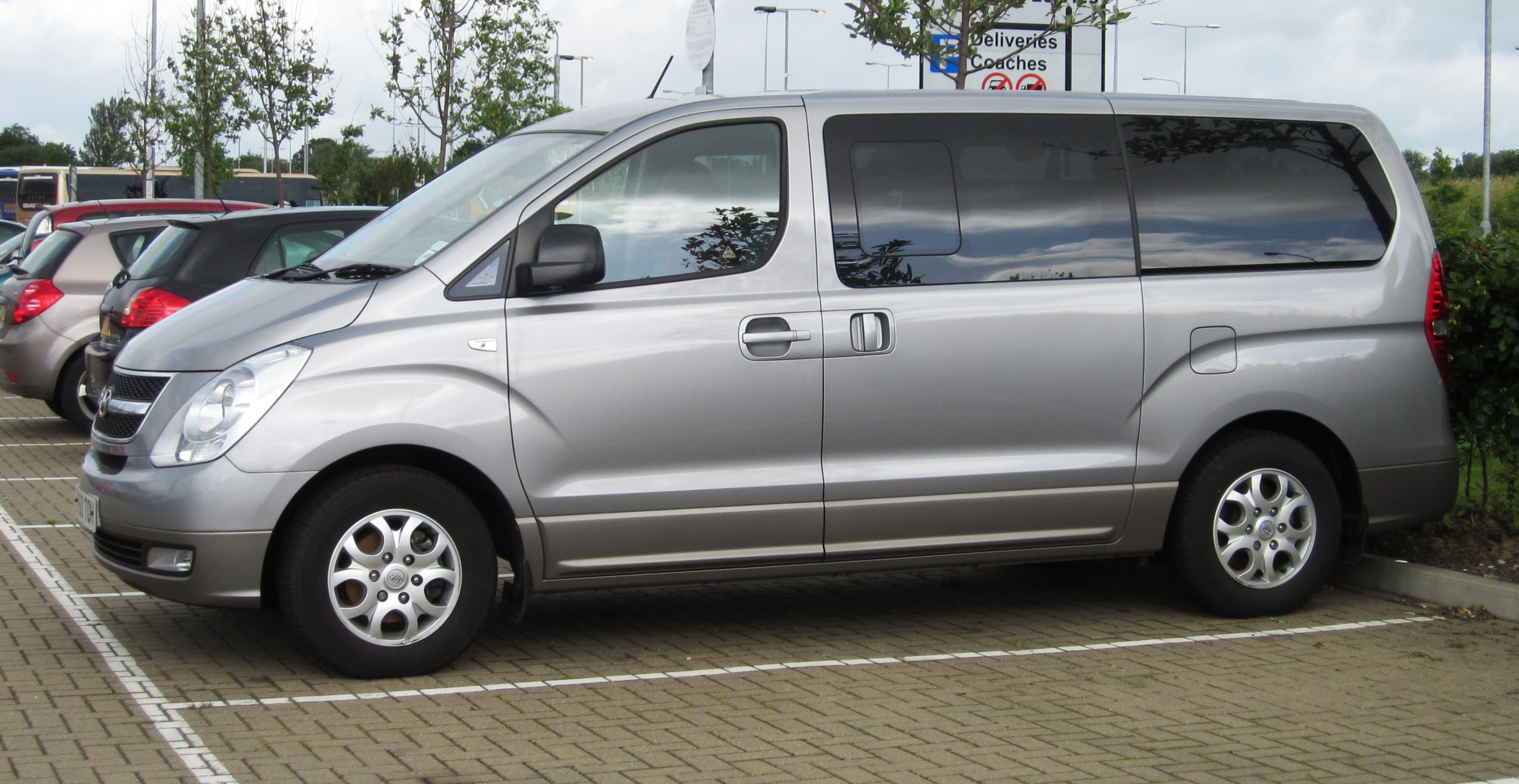 Hyundai Starex